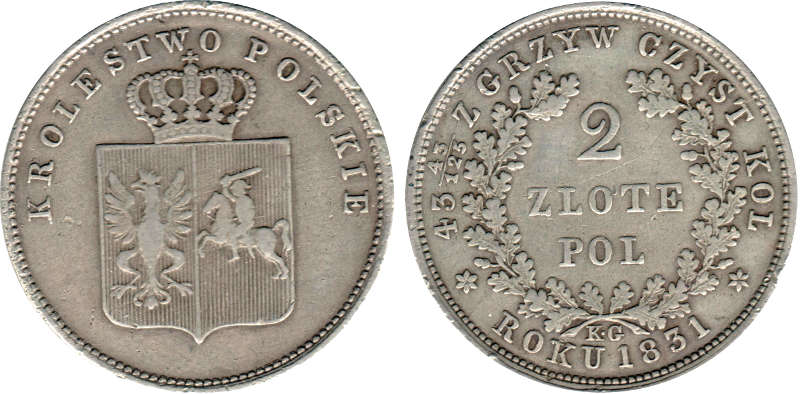 2 zlote polskie 1831 ZLOTE